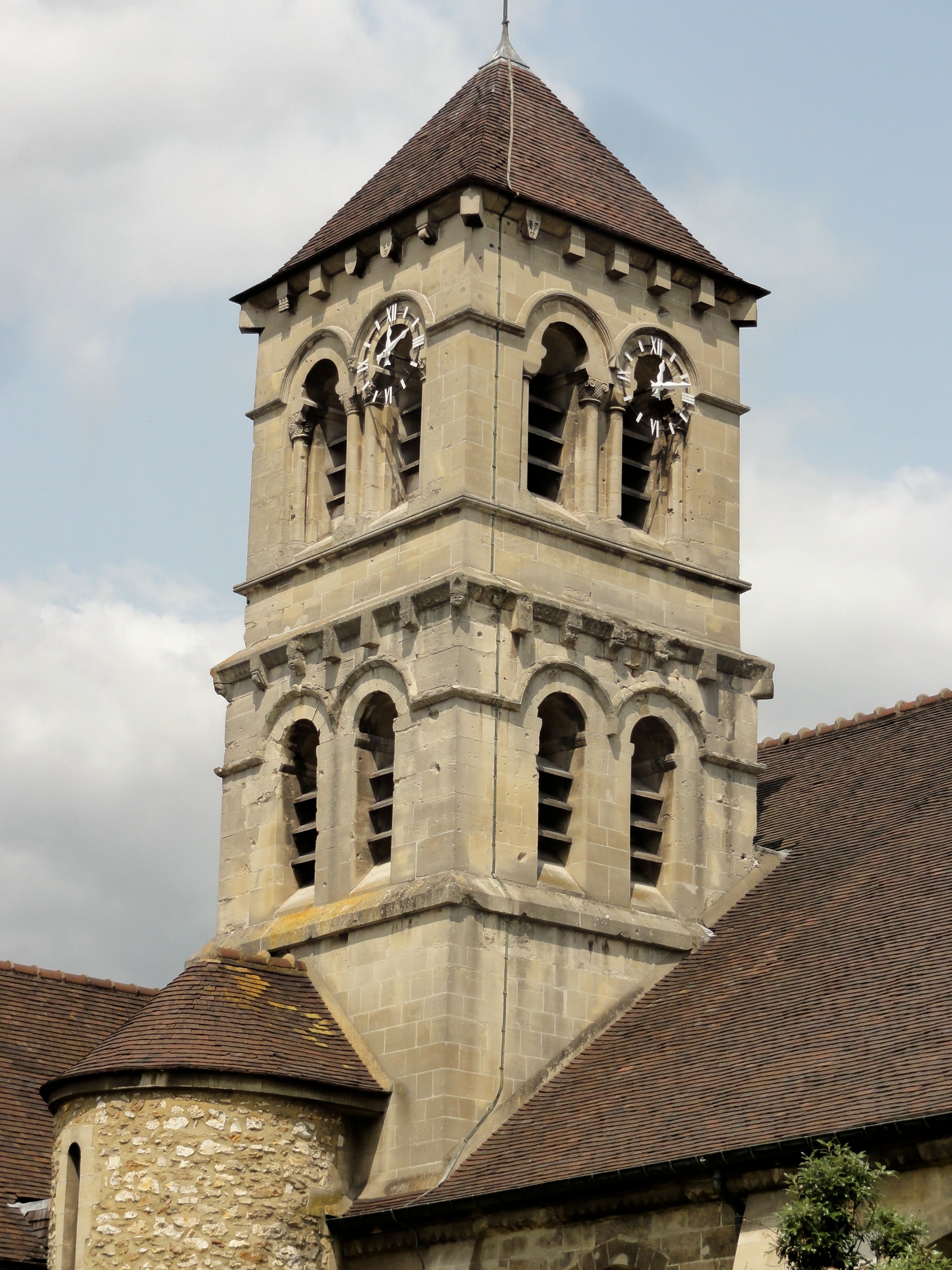 Clocher, vue depuis le sud-est.